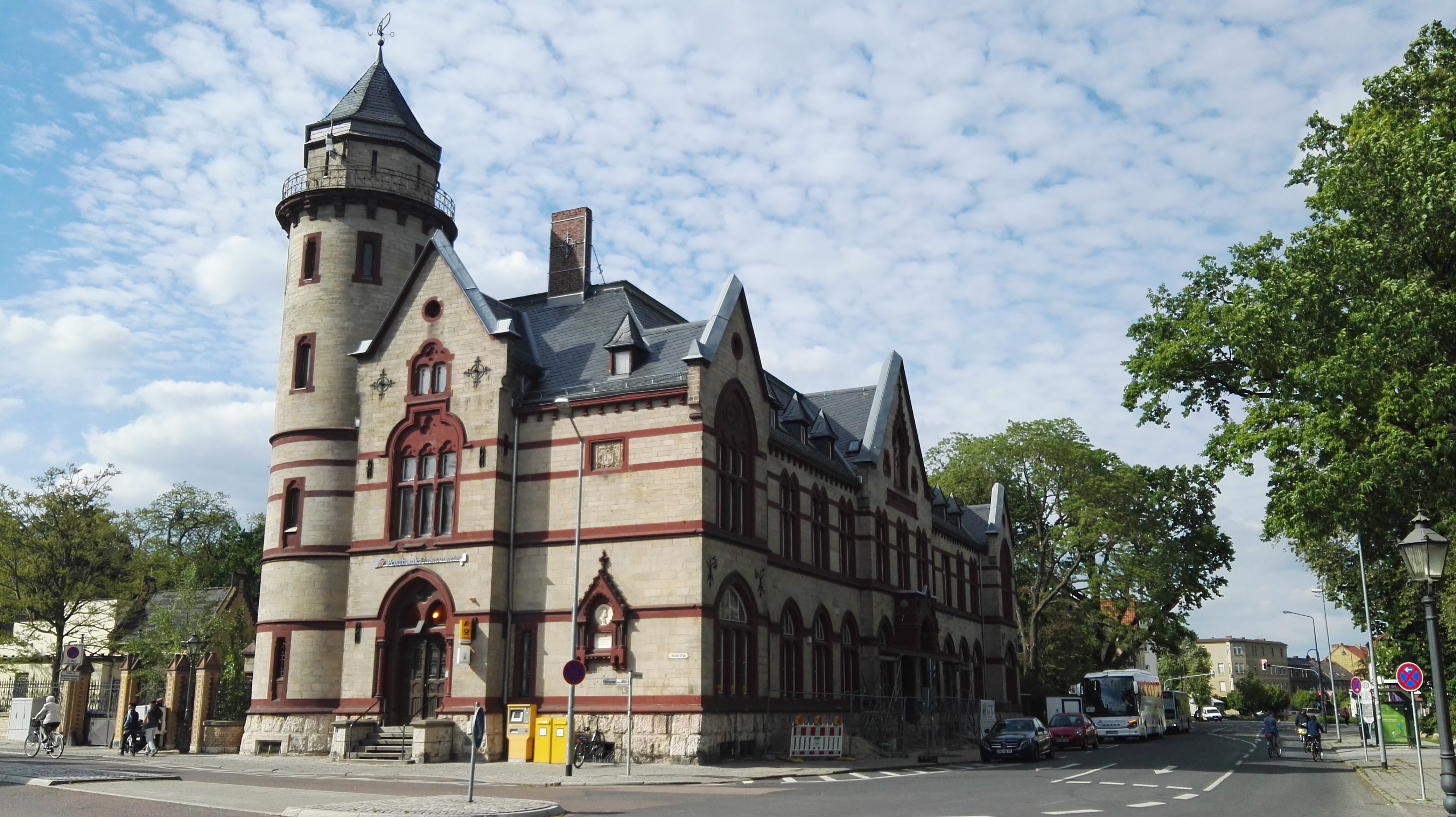 denkmalgeschützte Hauptpost in Wittenberg in der Wilhelm-Weber-Straße 5